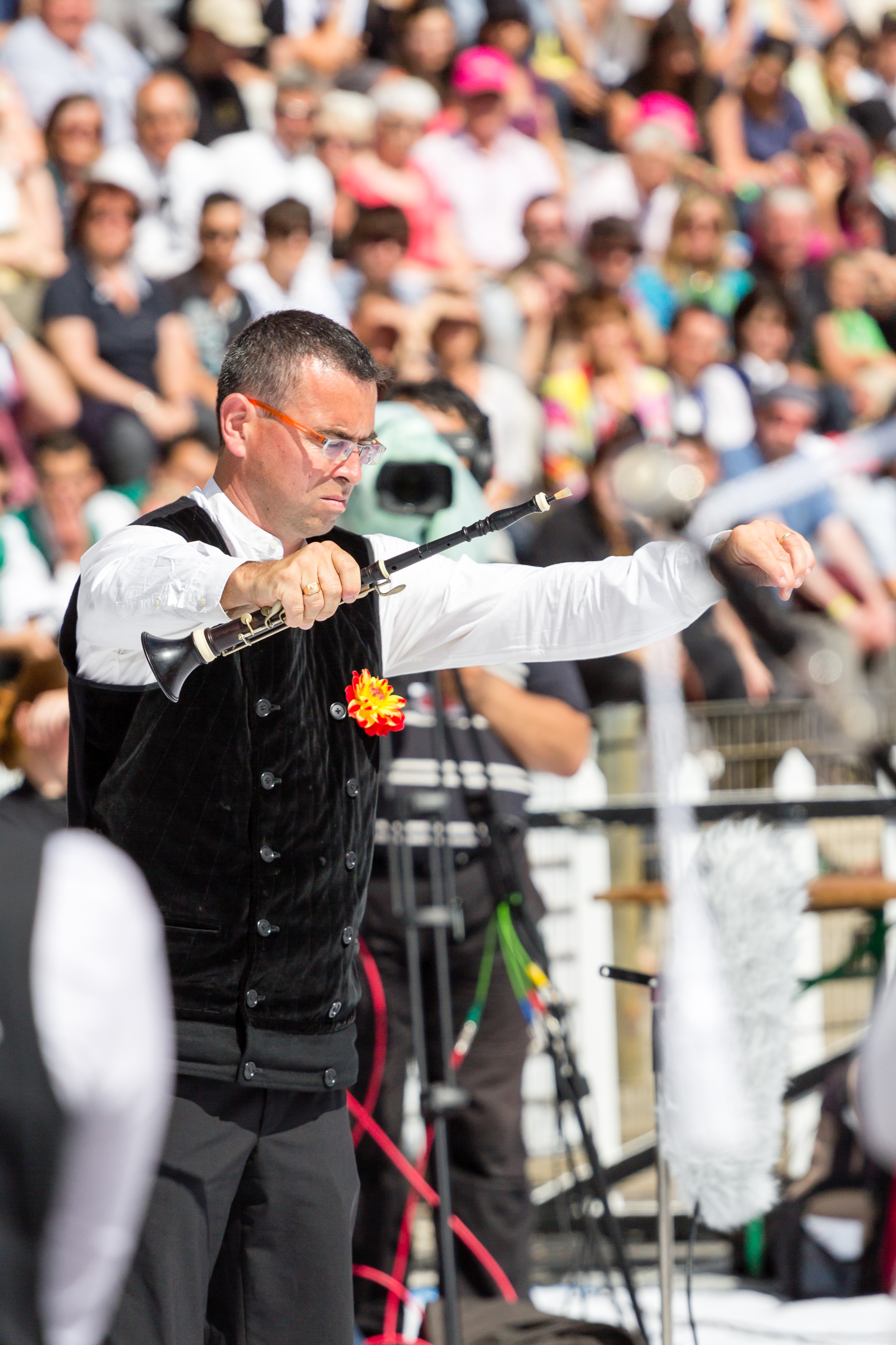 Tangi Sicard, penn sonneur du bagad Cap Caval lors du championnat national des bagadoù (première catégorie) au FIL 2012.